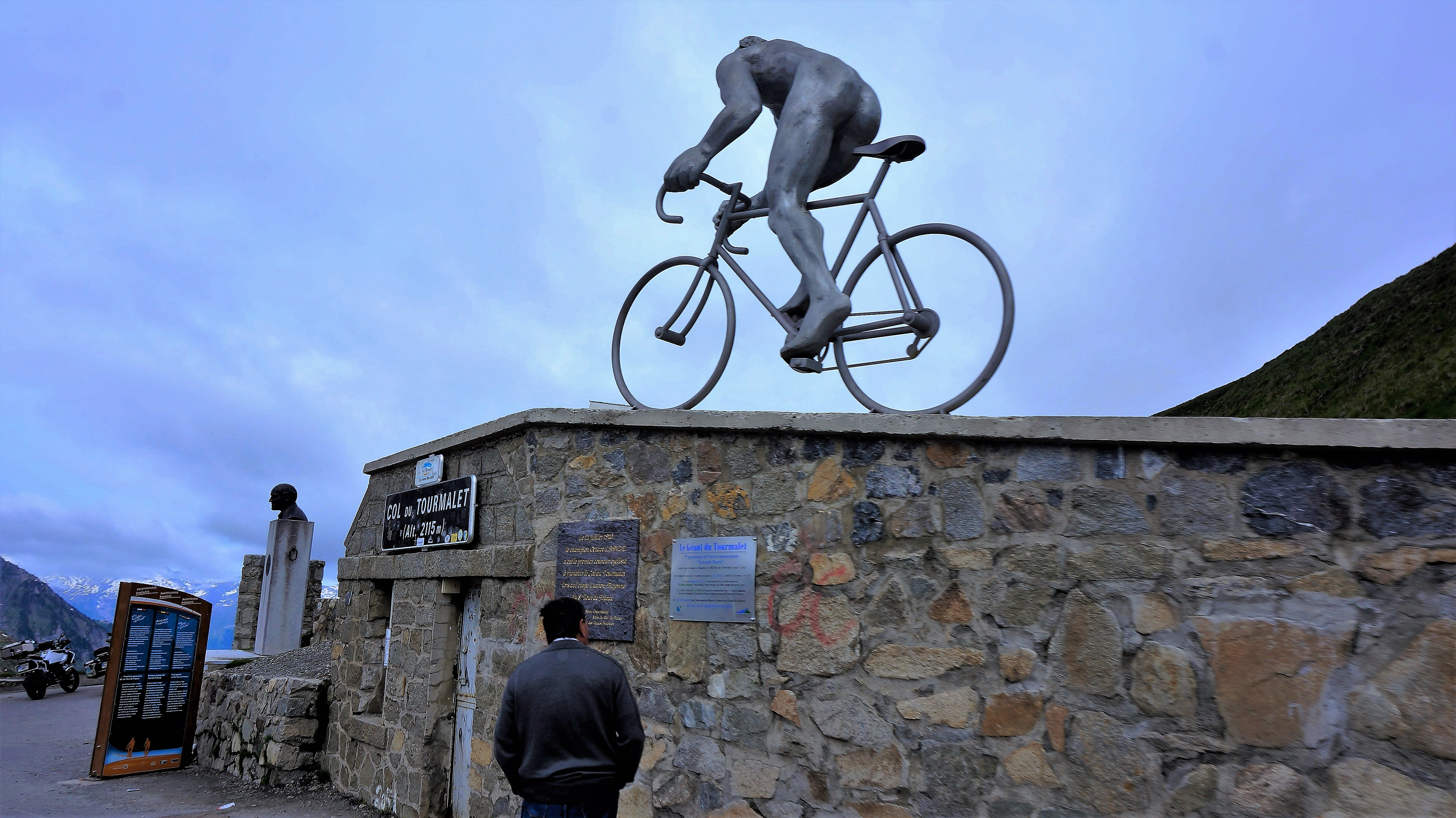 Col du Tourmalet